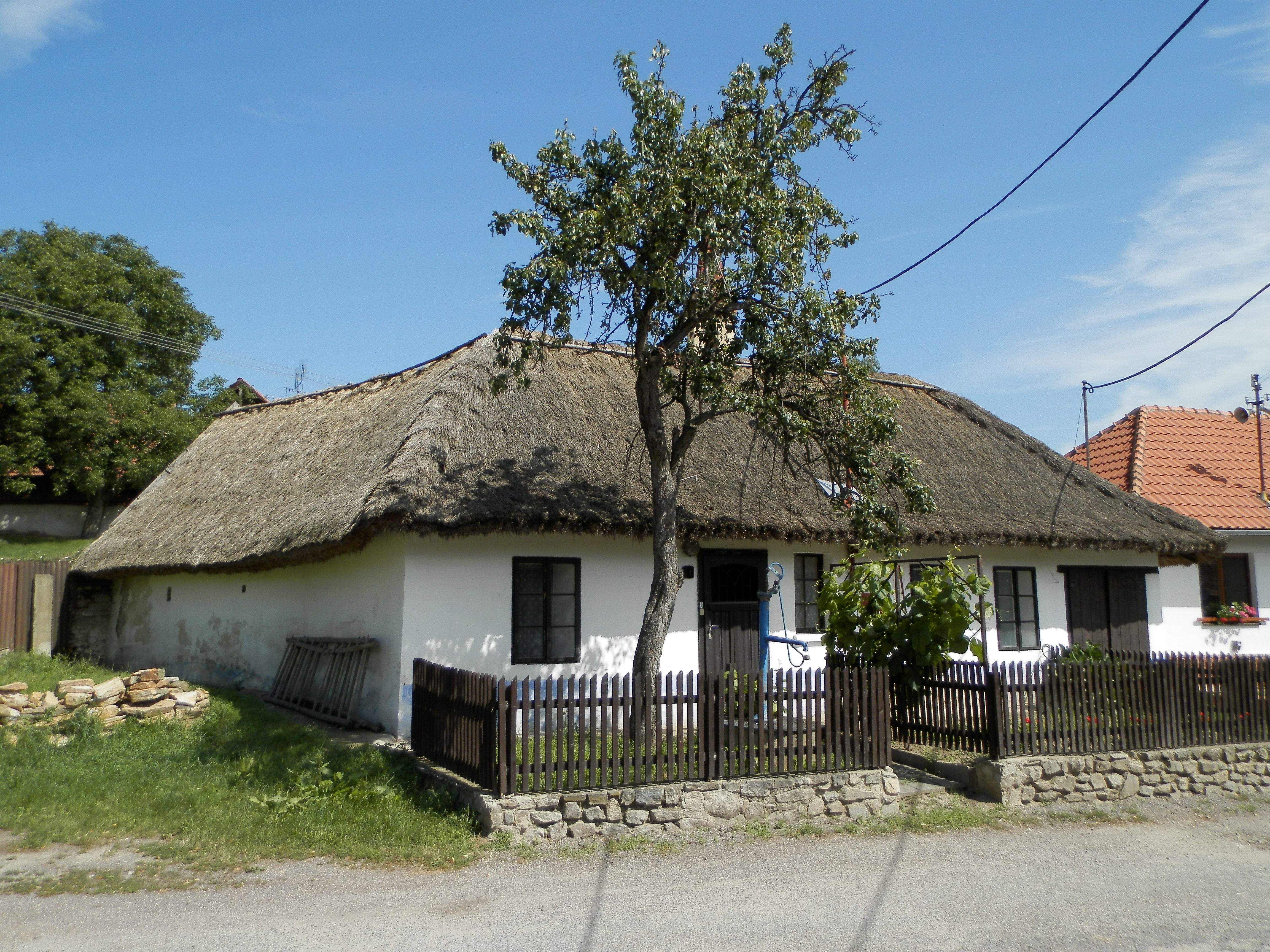 Venkovská usedlost (Petrovice), Petrovice 10